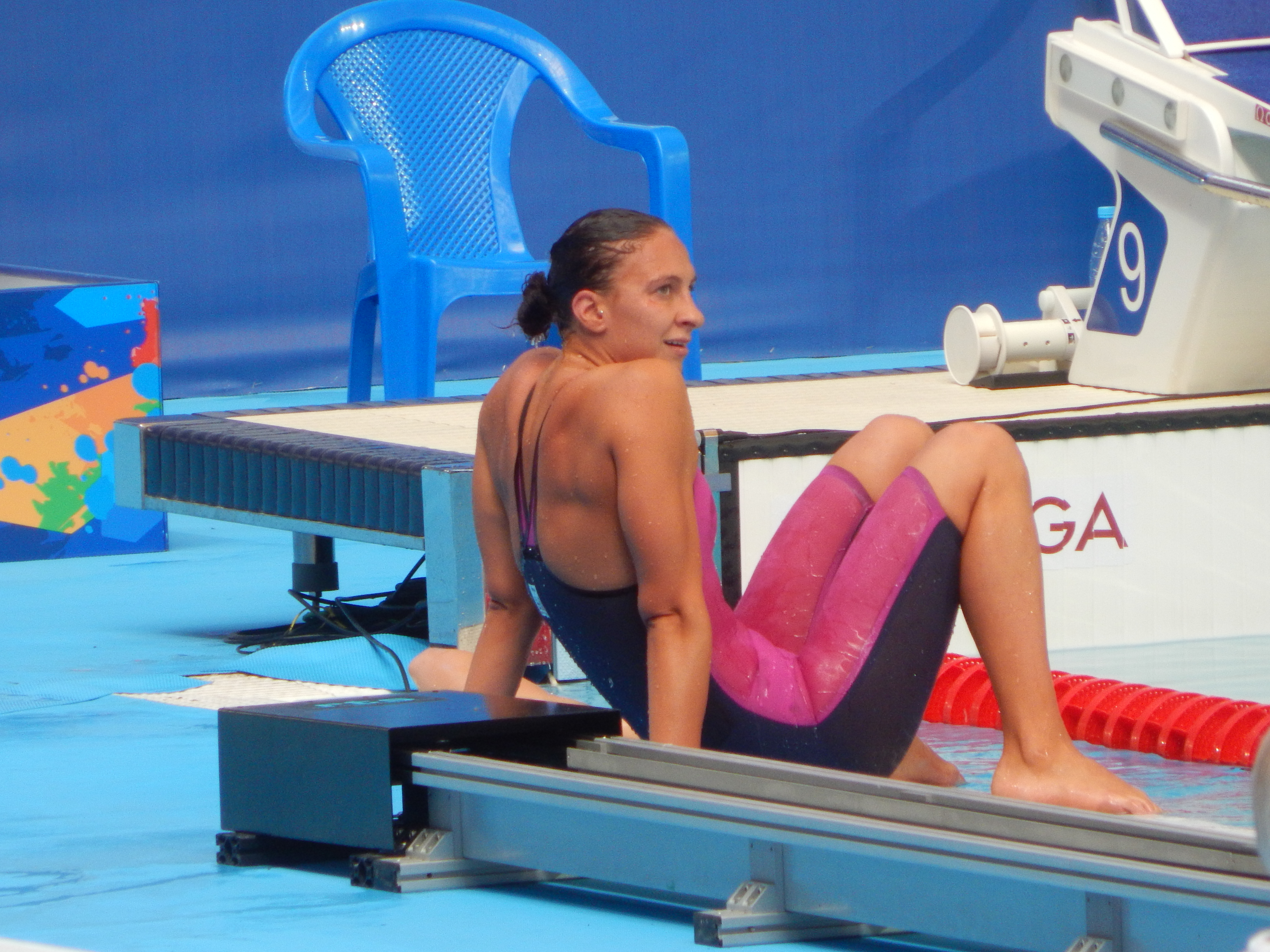 Барбора Завадова на чемпионате мира в Казани